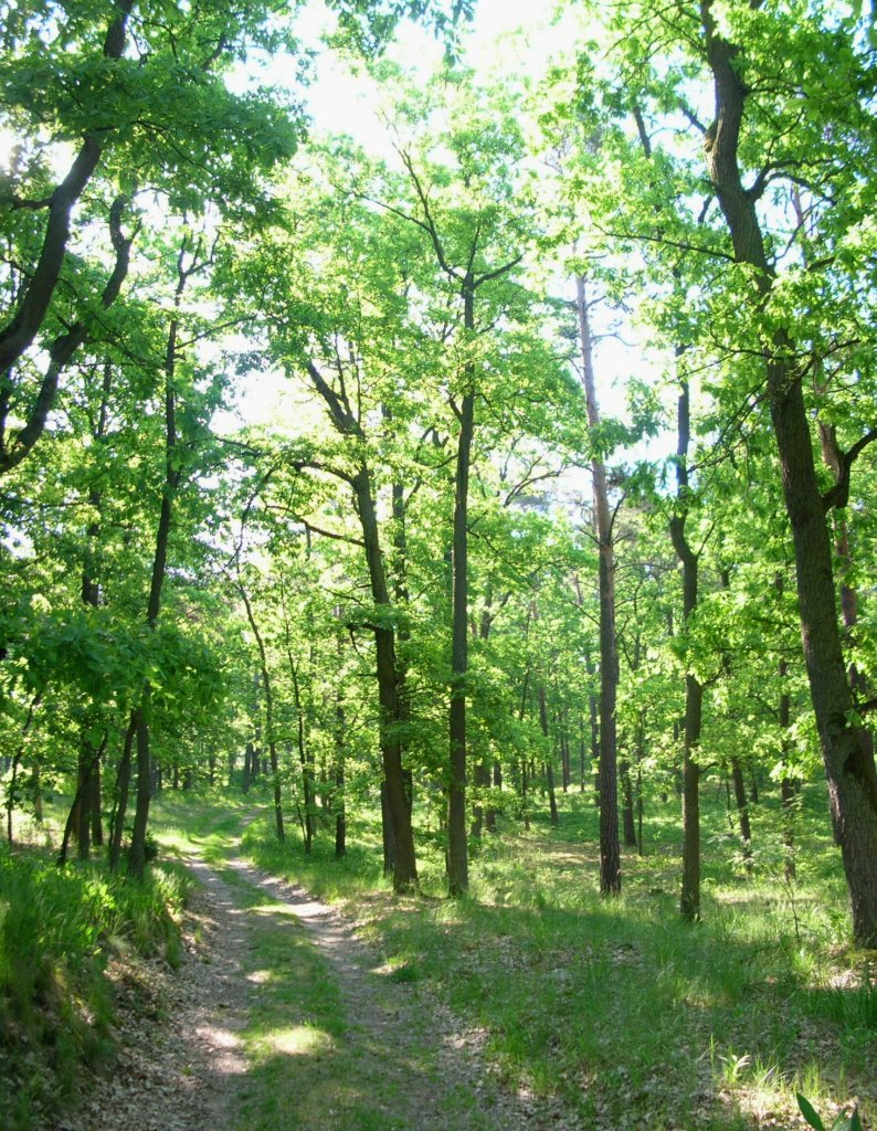 Rezerwat przyrody Dziki Ostrów w Puszczy Bydgoskiej